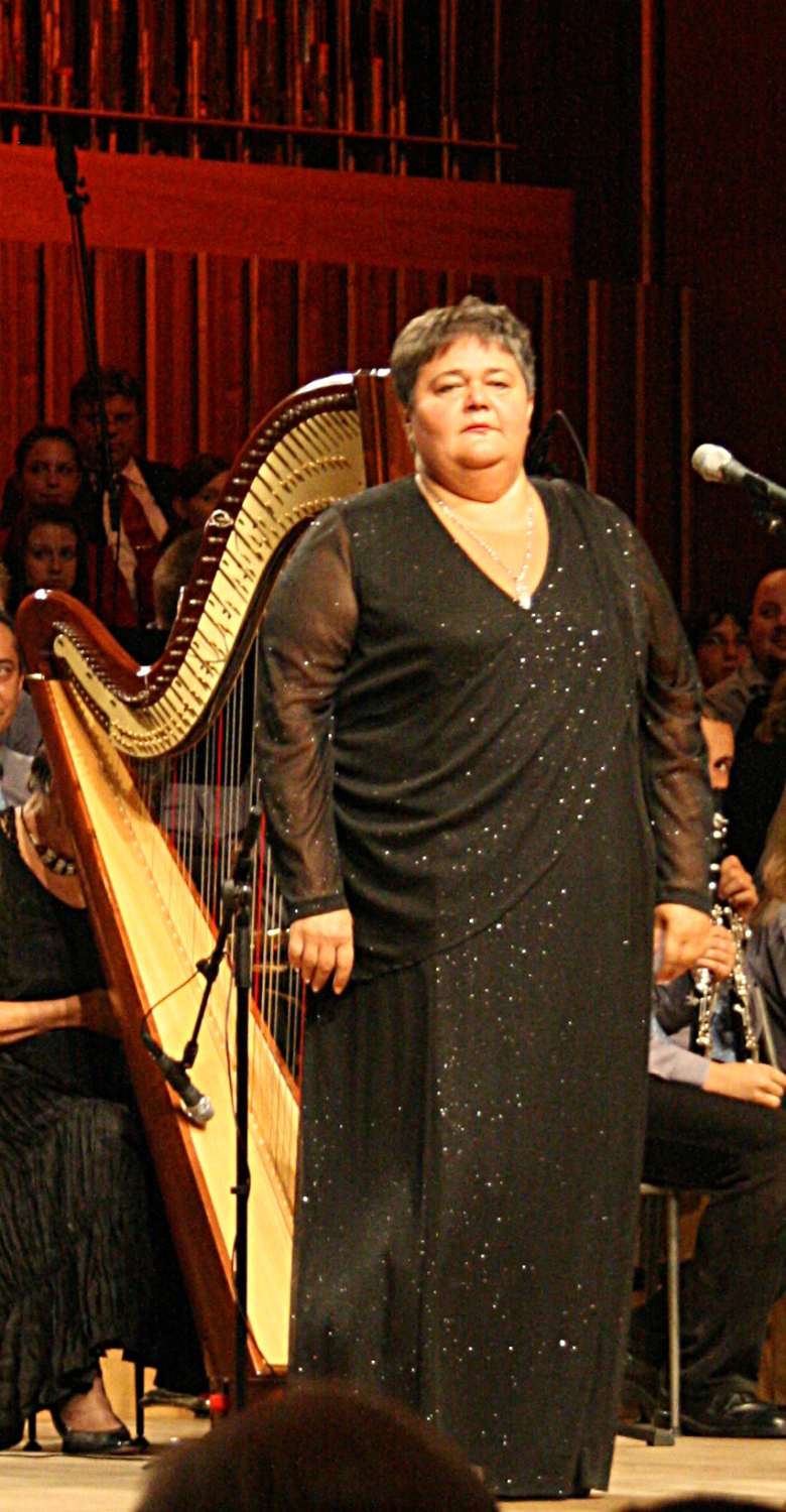 Dobrotvorni koncert "Križ nek' ti sačuva ime" u koncertnoj dvorani Vatroslav Lisinski u Zagrebu.